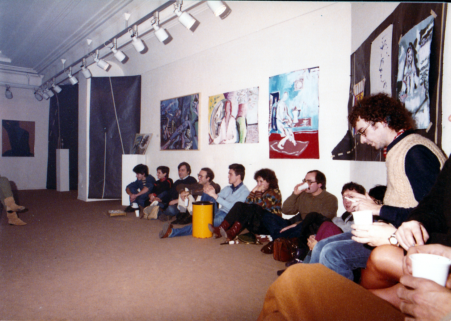 Una de las sesiones en 1983/84 de la Tertulia de Creadores en la Sala Minerva del Círculo de Bellas Artes de Madrid. Gregorio Morales es el cuarto por la izda.